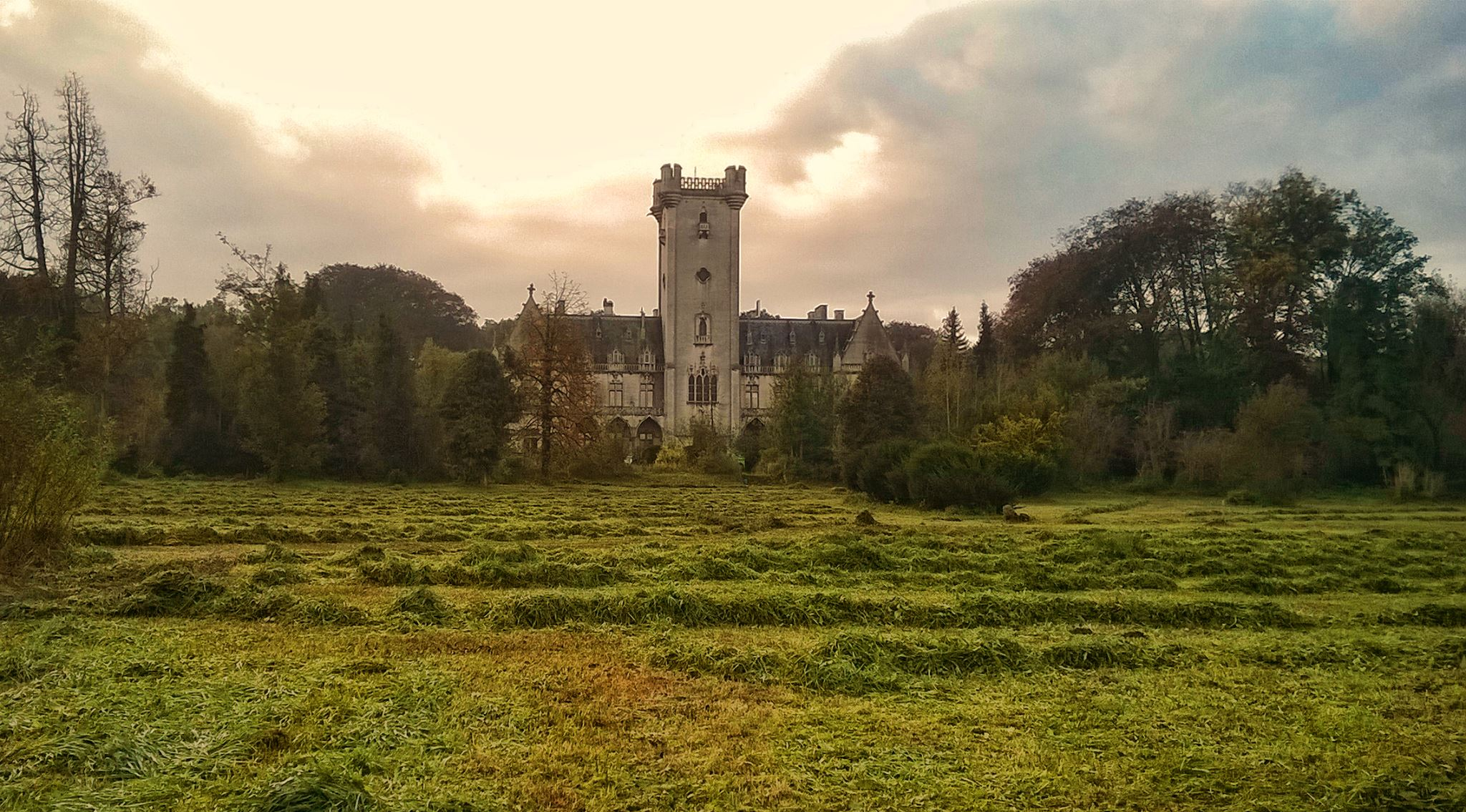 Sint-Janscollege (Meldert), sinds 1957 ingericht in het 19de-eeuwse neogotische Kasteel van Meldert